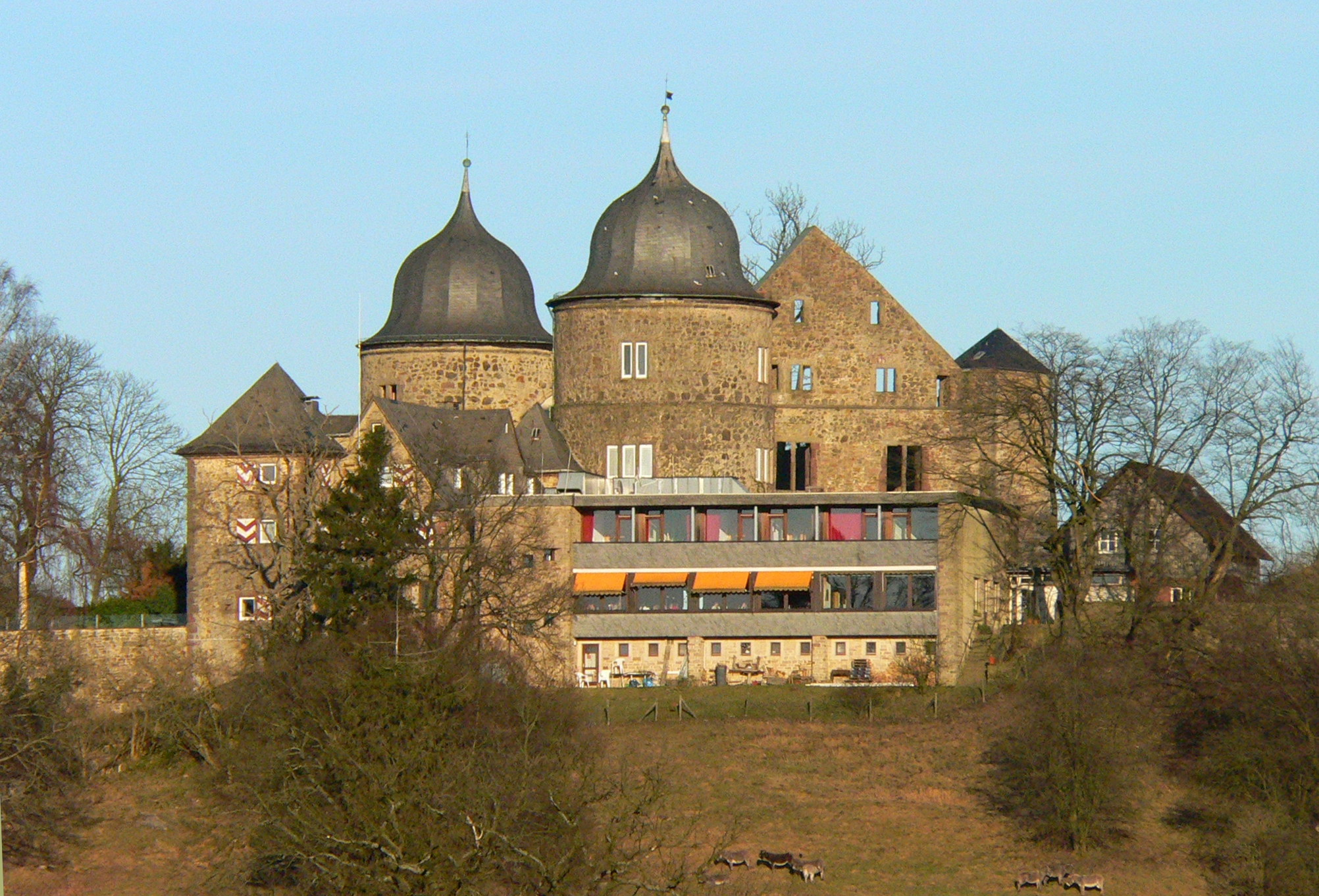 Sababurg im Reinhardswald (Hessen), Ansicht von Westen